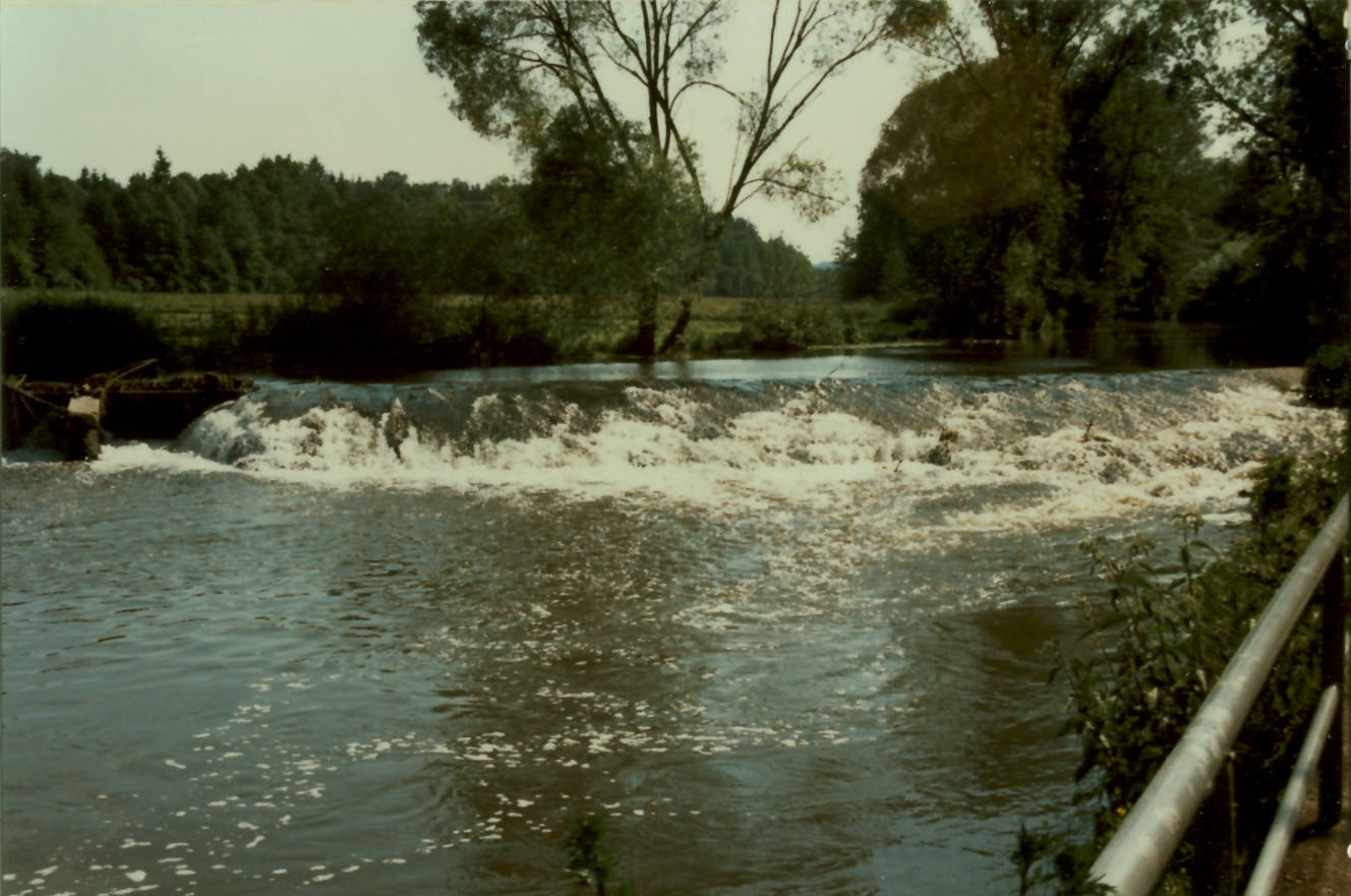 Rednitz bei Georgensgmünd (Mittelfranken)